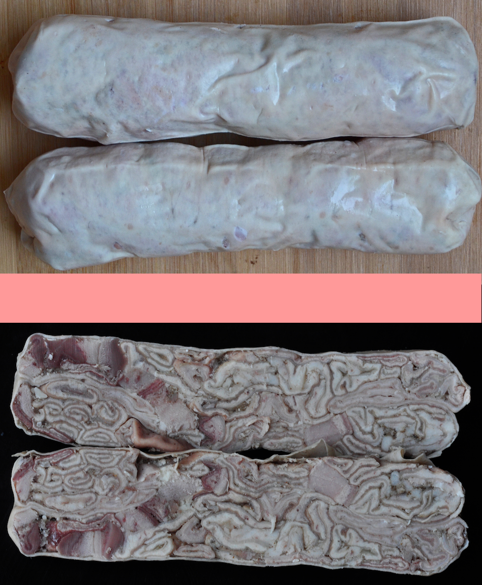 Andouillettes de fabrication artisanale dressées main avec soin par un artisan aubois, Christophe Thierry, montrées coupées dans le sens de la longueur.